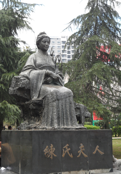 树立在福建省建瓯市中心的练氏夫人的铜像，她曾在战争中挽救过全城百姓。